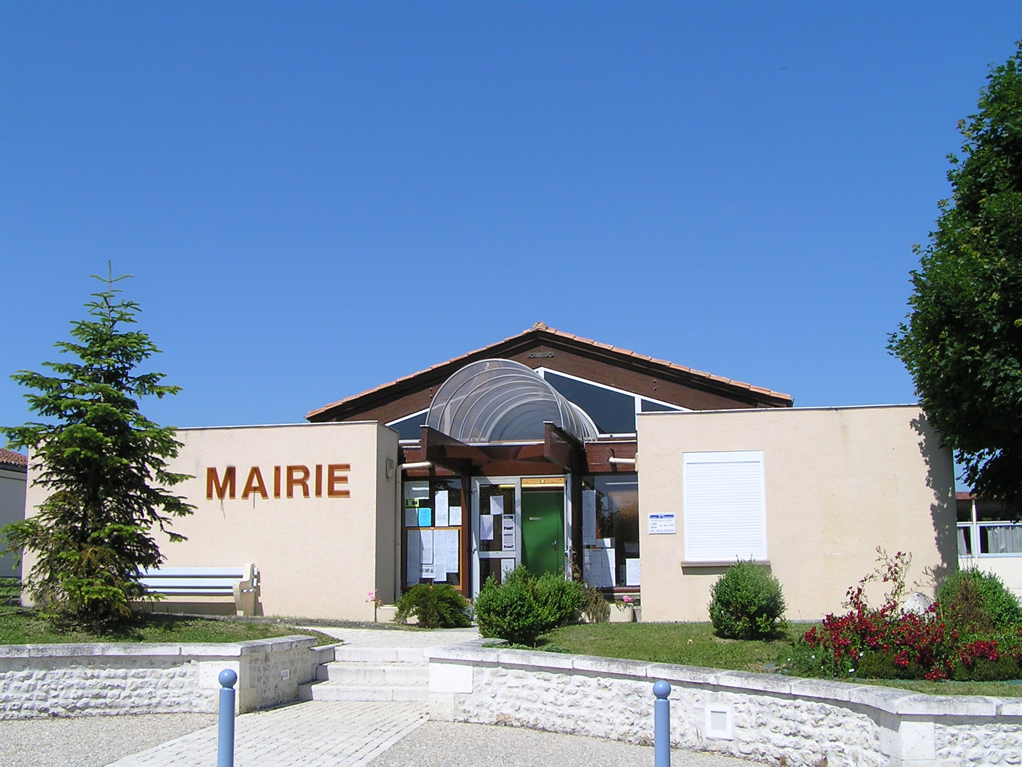 mairie de Salles-de-Barbezieux, Charente, France